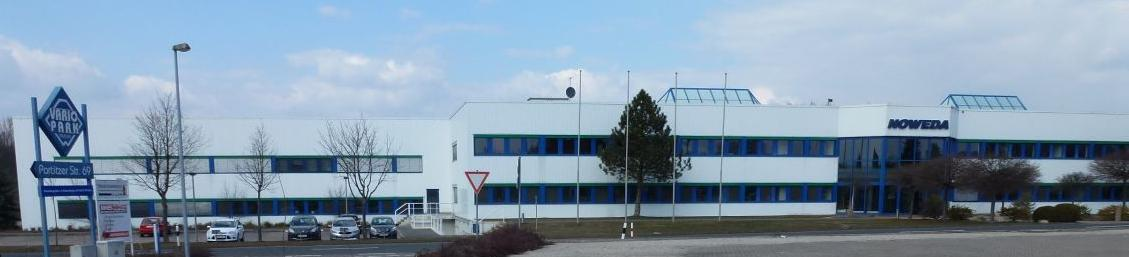 NOWEDA-Filiale in Taucha